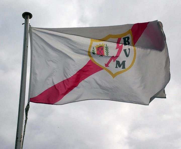 Bandera del Rayo Vallecano